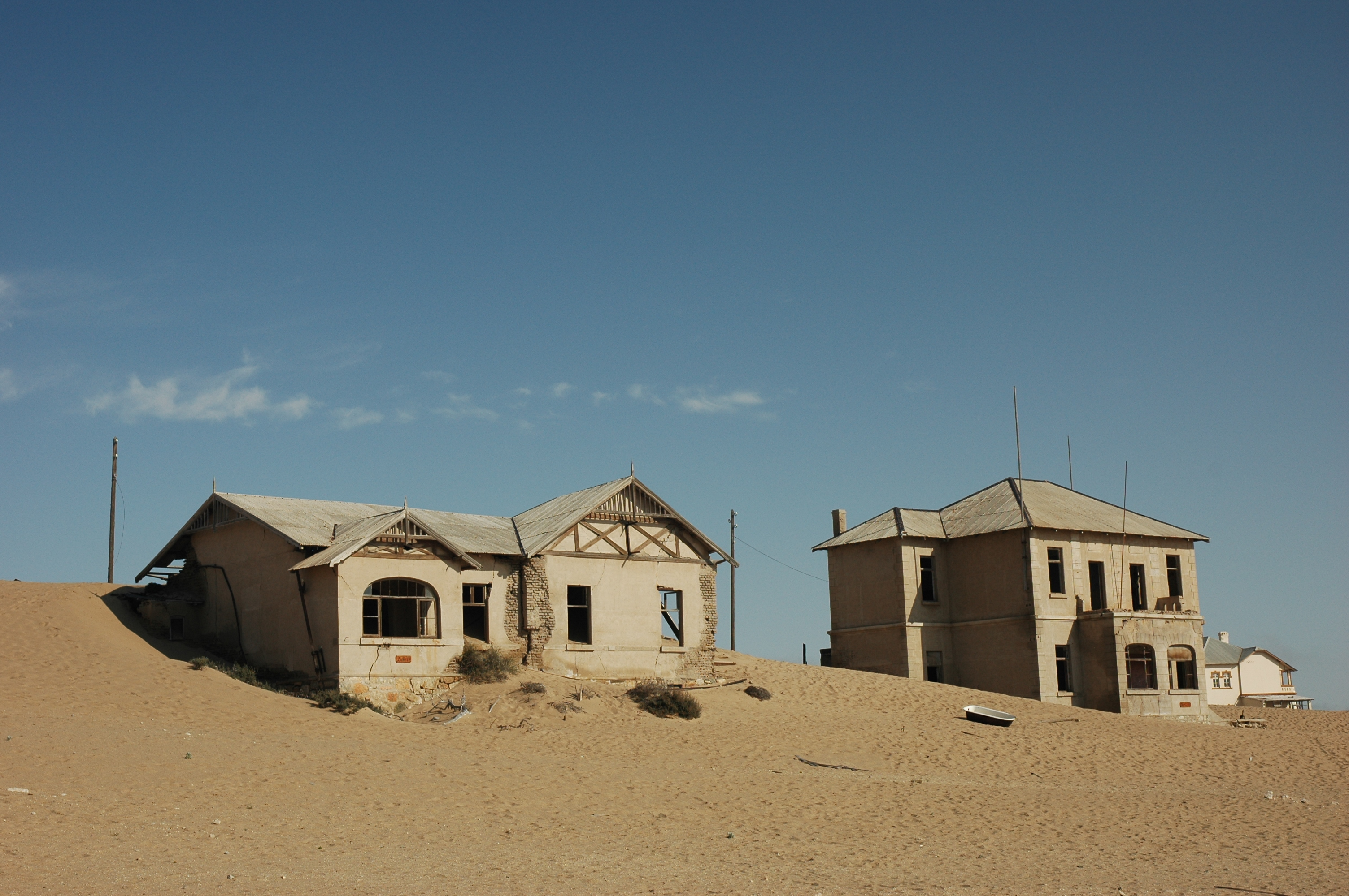 Namibie Kolmannskuppe Photographie prise par GIRAUD Patrick